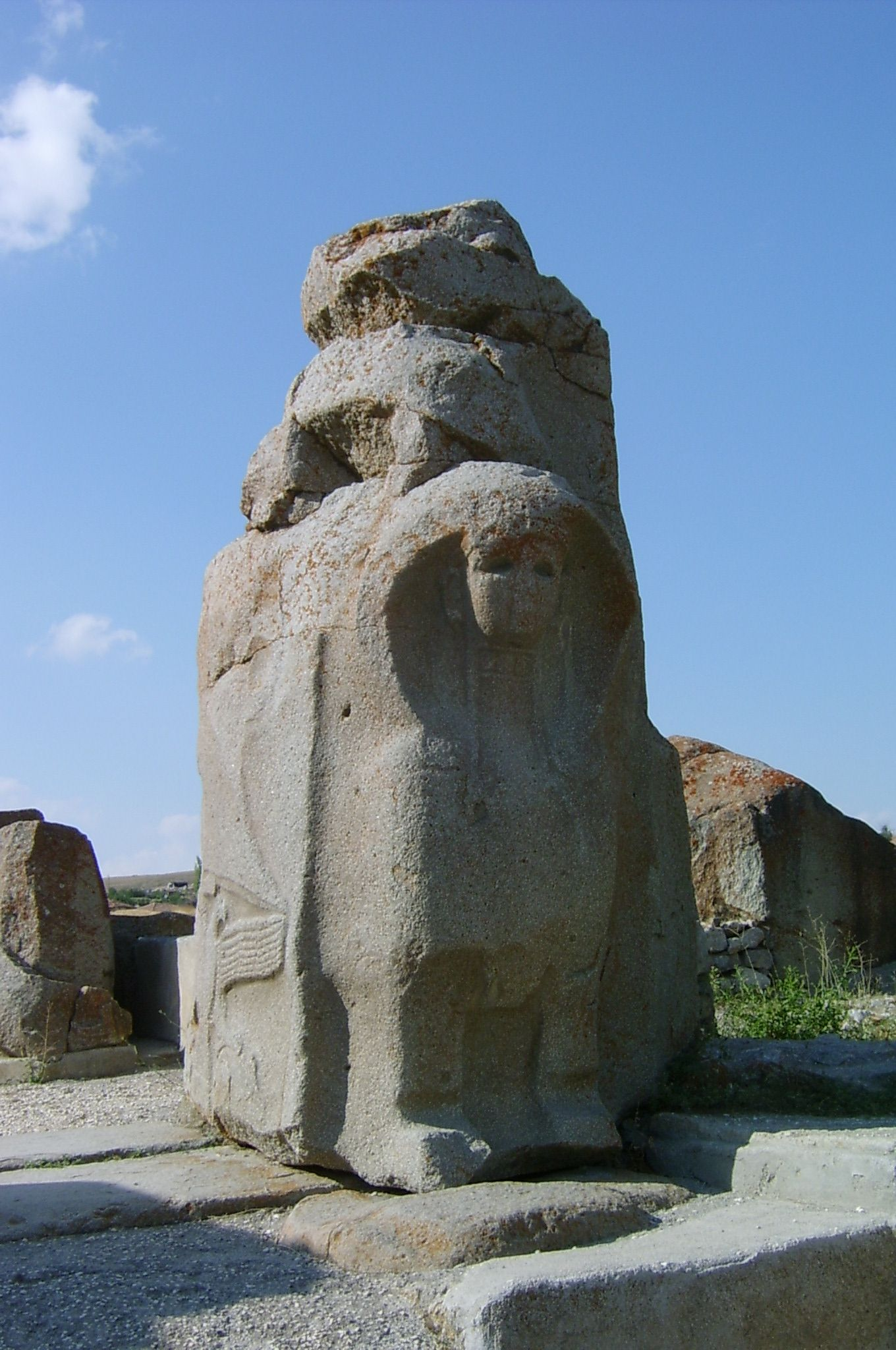 Gates of Alaca Hüyük